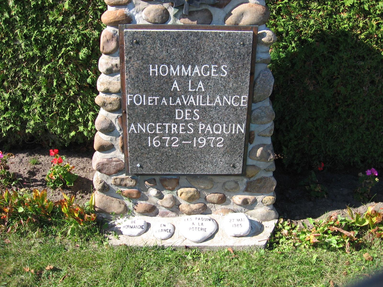 Monument dédié aux familles Paquins